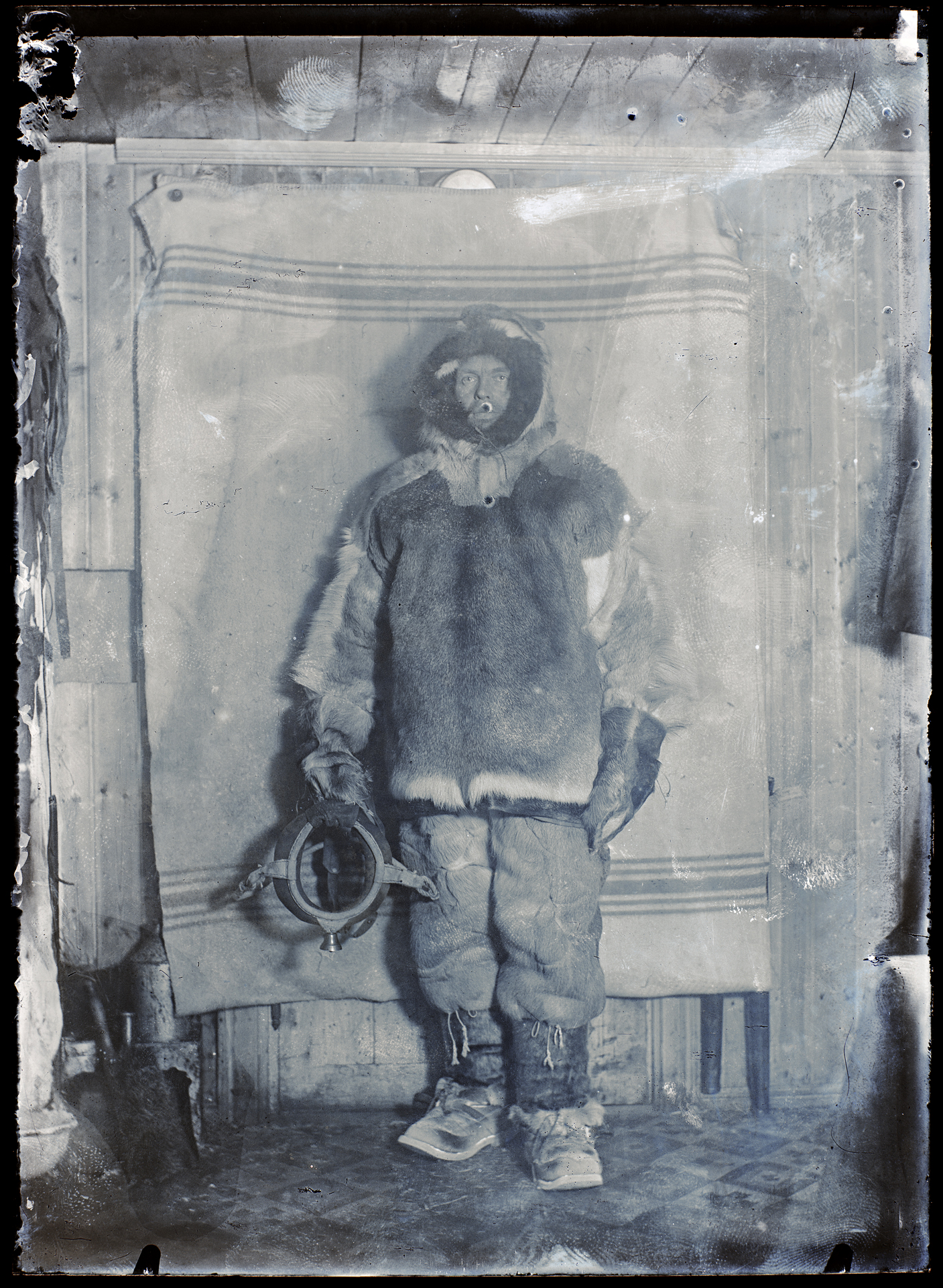 Tittel / Title: Portrett av Olav Bjaaland (1873-1961) Motiv / Motif: Negativ glassplate. Reinskinnsdraktene som ble brukt var ikke sydd etter mål, og enhver gjorde de forandringer han mente var nødvendig. Dato / Date: 1911 Fotograf / Photographer: ukjent / unknown Sted / Place: Antarktis, Hvalbukta, Framheim Eier / Owner Institution: Nasjonalbiblioteket / National Library of Norway Lenke / Link: Bildesignatur / Image Number: bldsa_NPRA1129